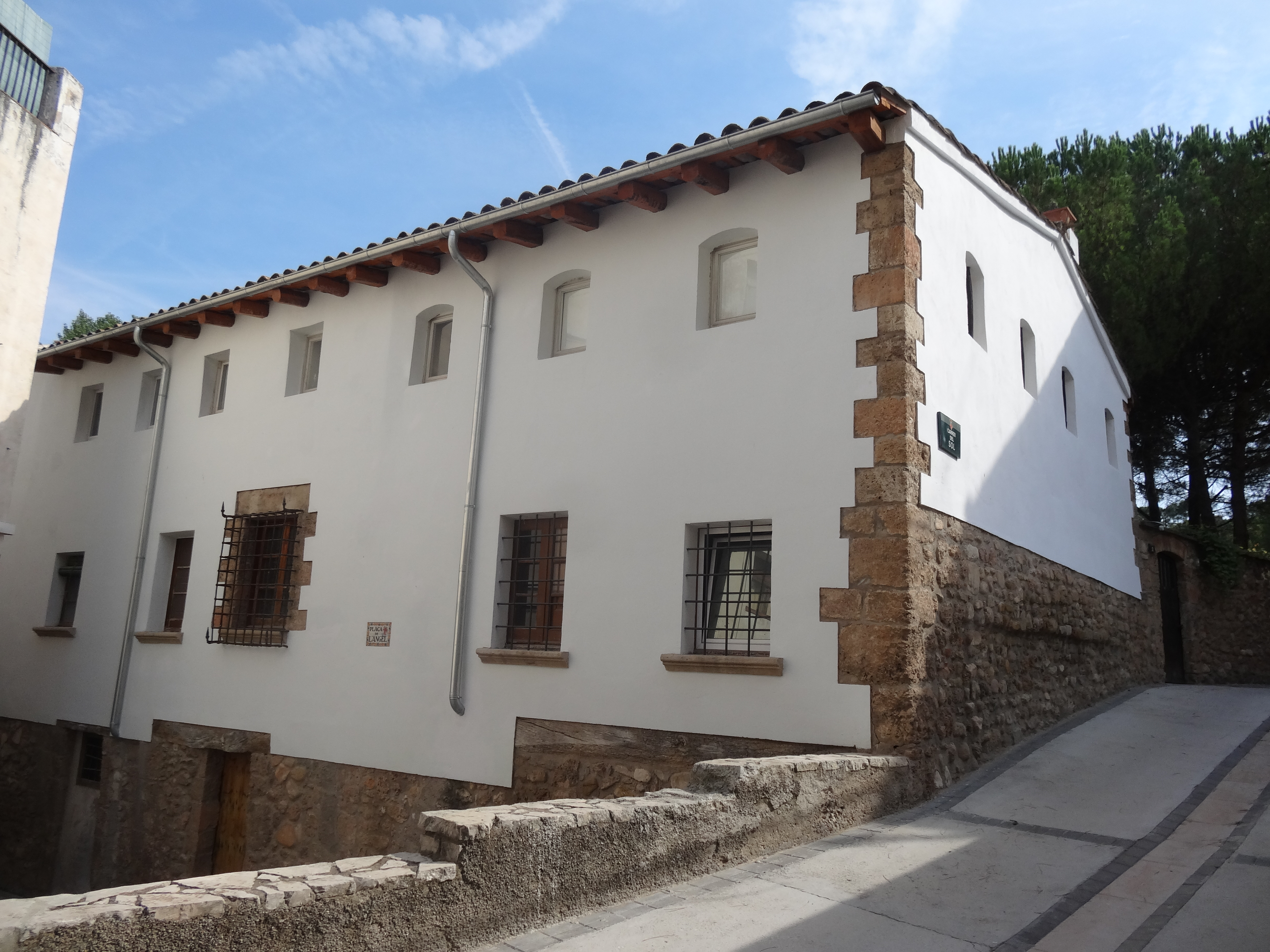 La Pobla de Claramunt. Molí de Dalt de Cal Coca. Façana plaça de l'Ànge i carrer del Sol.